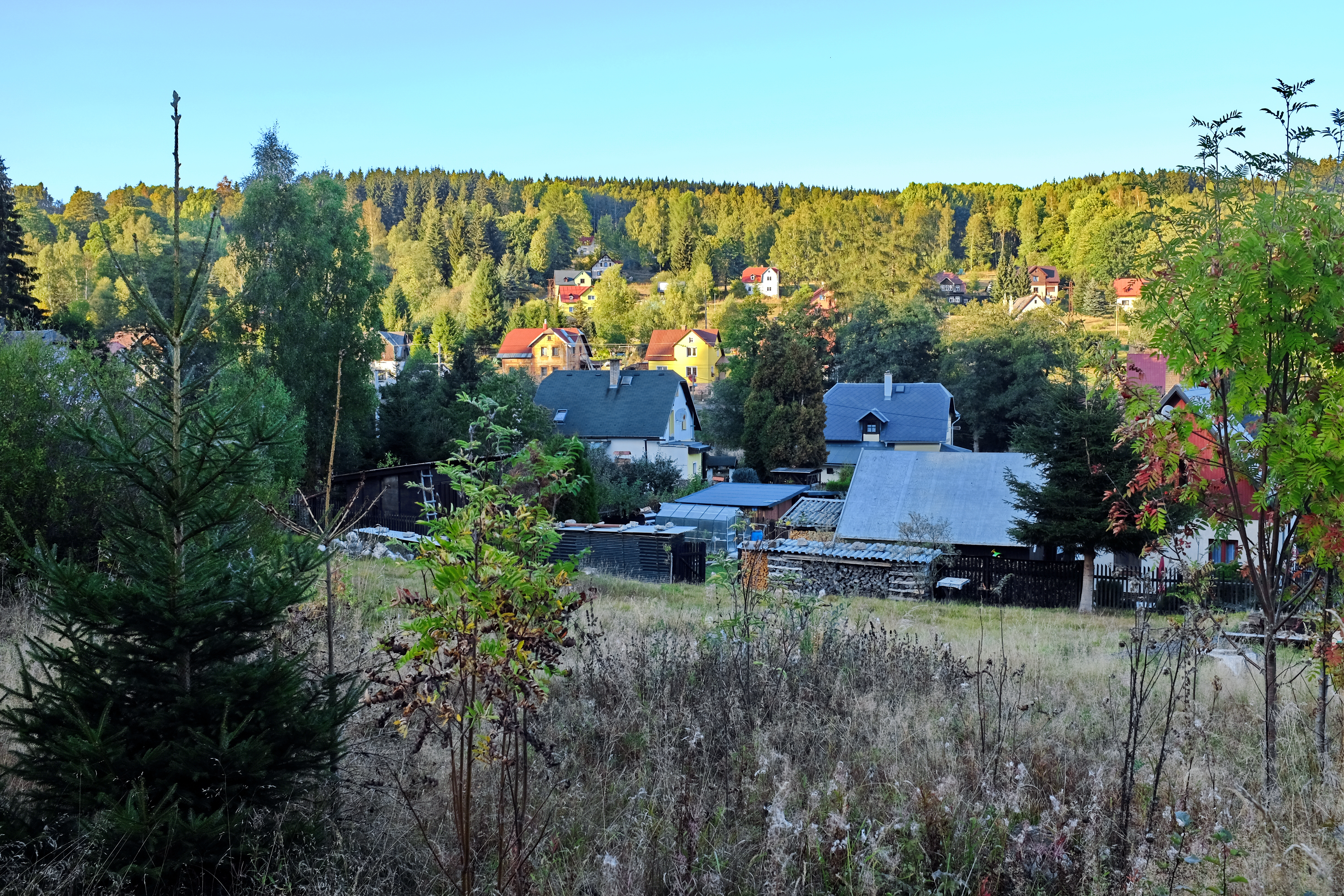 Vysoká Pec, Krušné hory, okres Karlovy Vary